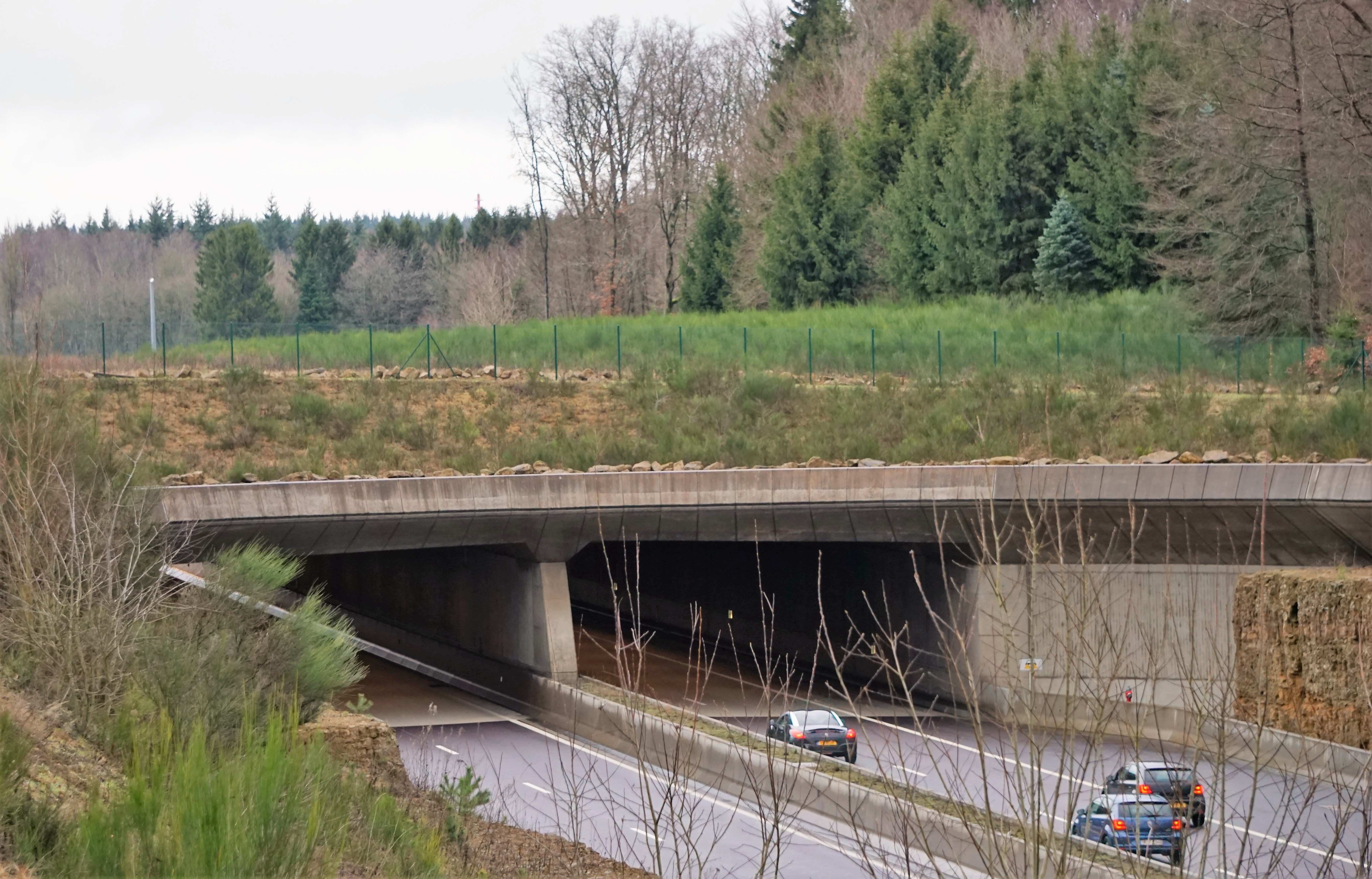 Écoduc « Réngelbur » enjambant les 4 voies de l'autoroute A7 au Grand-Duché de Luxembourg, commune de Steinsel. Accès sud du tunnel autoroutier.